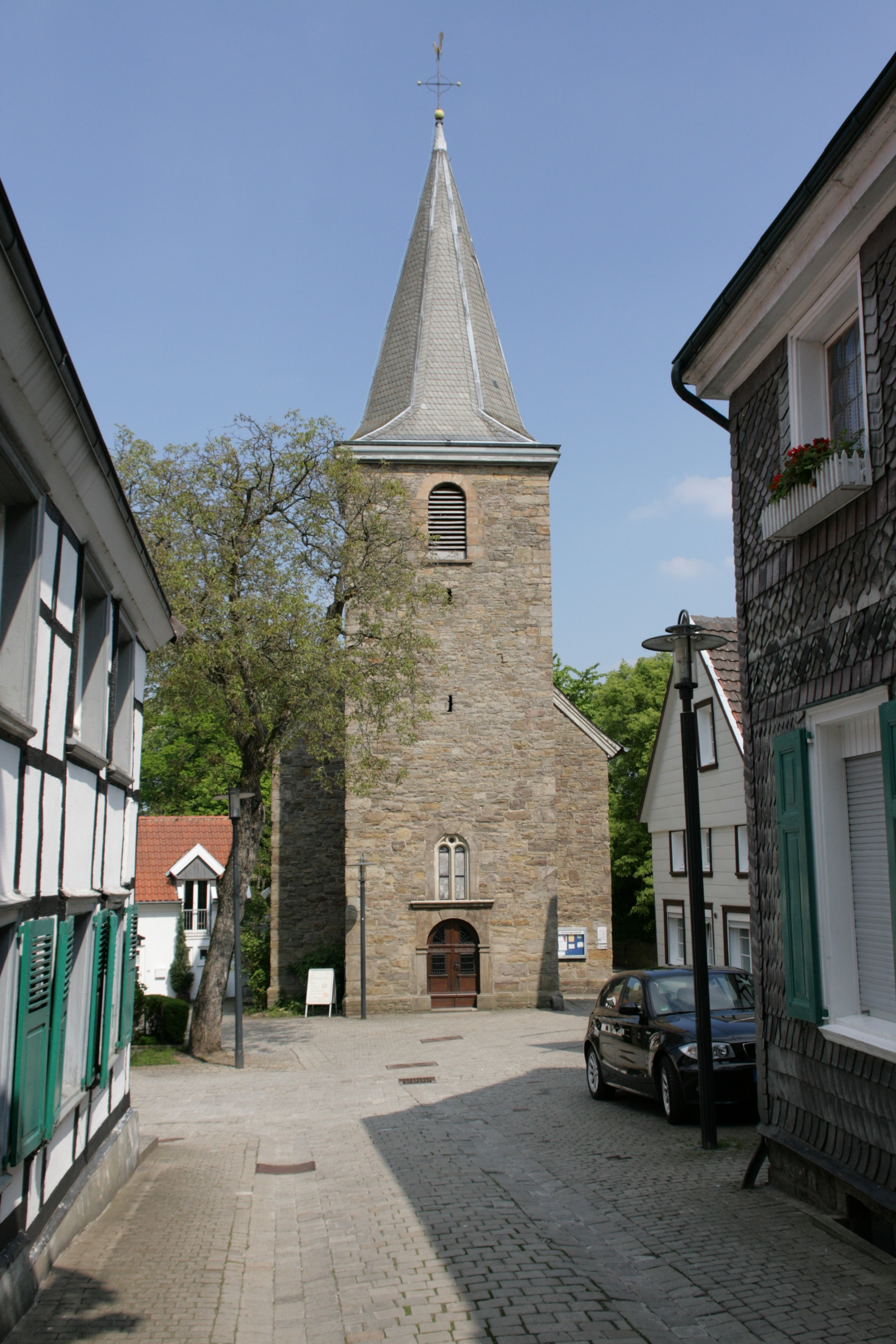 Burgstraße in Hattingen-Blankenstein